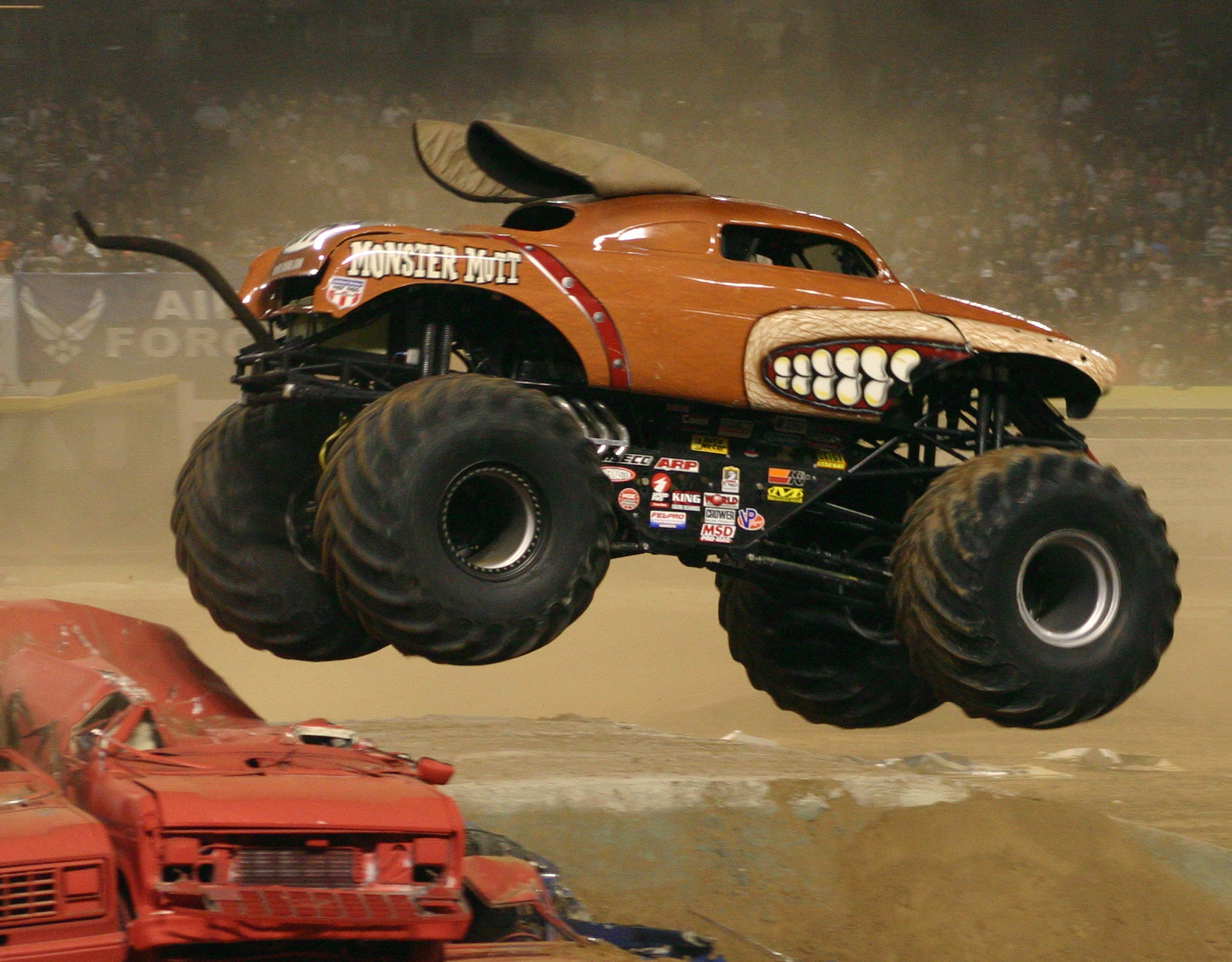 Taken by Jot Powers, 1/2006